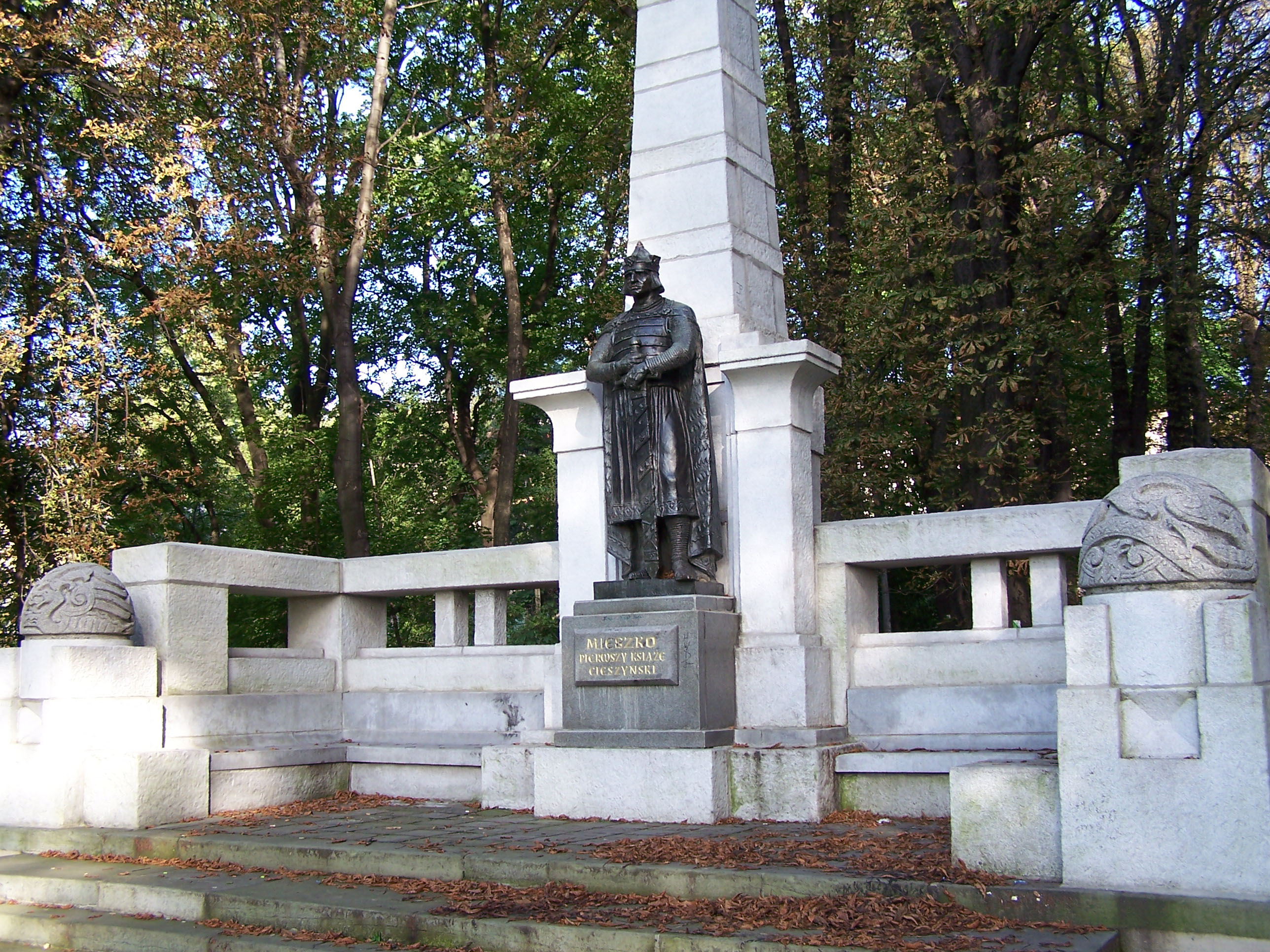 Mieszko I monument in Cieszyn, Poland